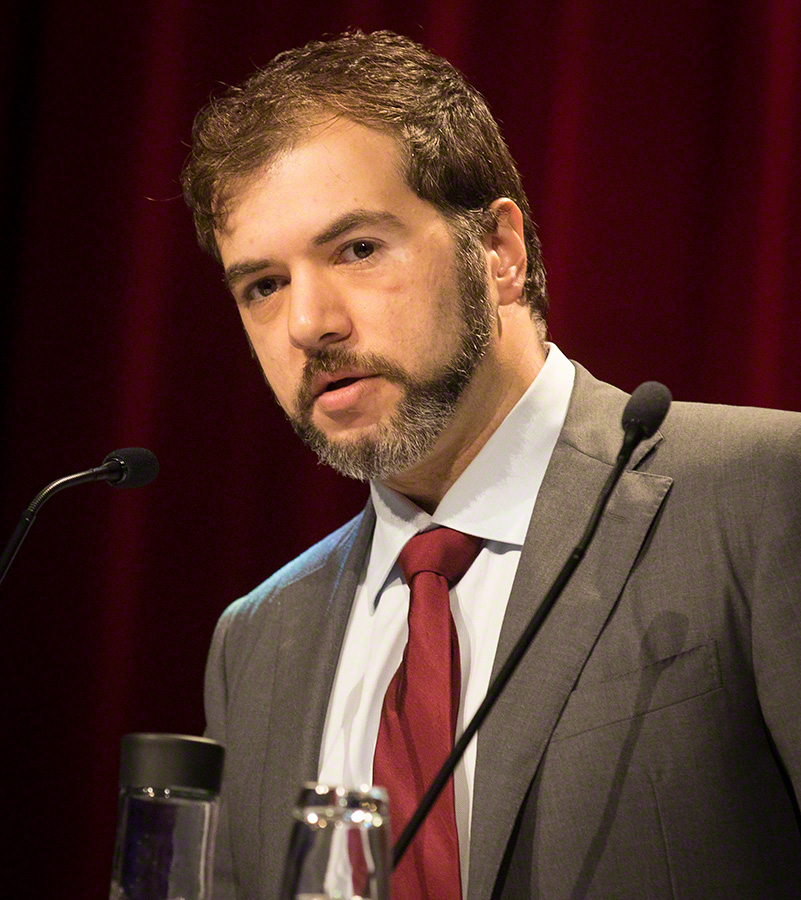 Debatt om innvandring som markerte åpningen av Forskningsdagene 2016. Arrangementet var på Edderkoppen på Scandic St. Olavs plass den 21. september 2016. Deltakere: Anne Britt Djuve (Fafo) Knut Røed (Frischsenteret) Erling Holmøy (SSB) Thomas Hegghammer (FFI) Hanne Caroline S. Iversen (JD) Svein Oppegaard (NHO) Tor-Arne Solbakken (LO) Tino Sanandaji Andreas C. Halse (Sv) Heidi Nordby Lunde (H) Sylo Taraku (Agenda) Ordstyrere: Erik Tornes Mina Hauge Nærland